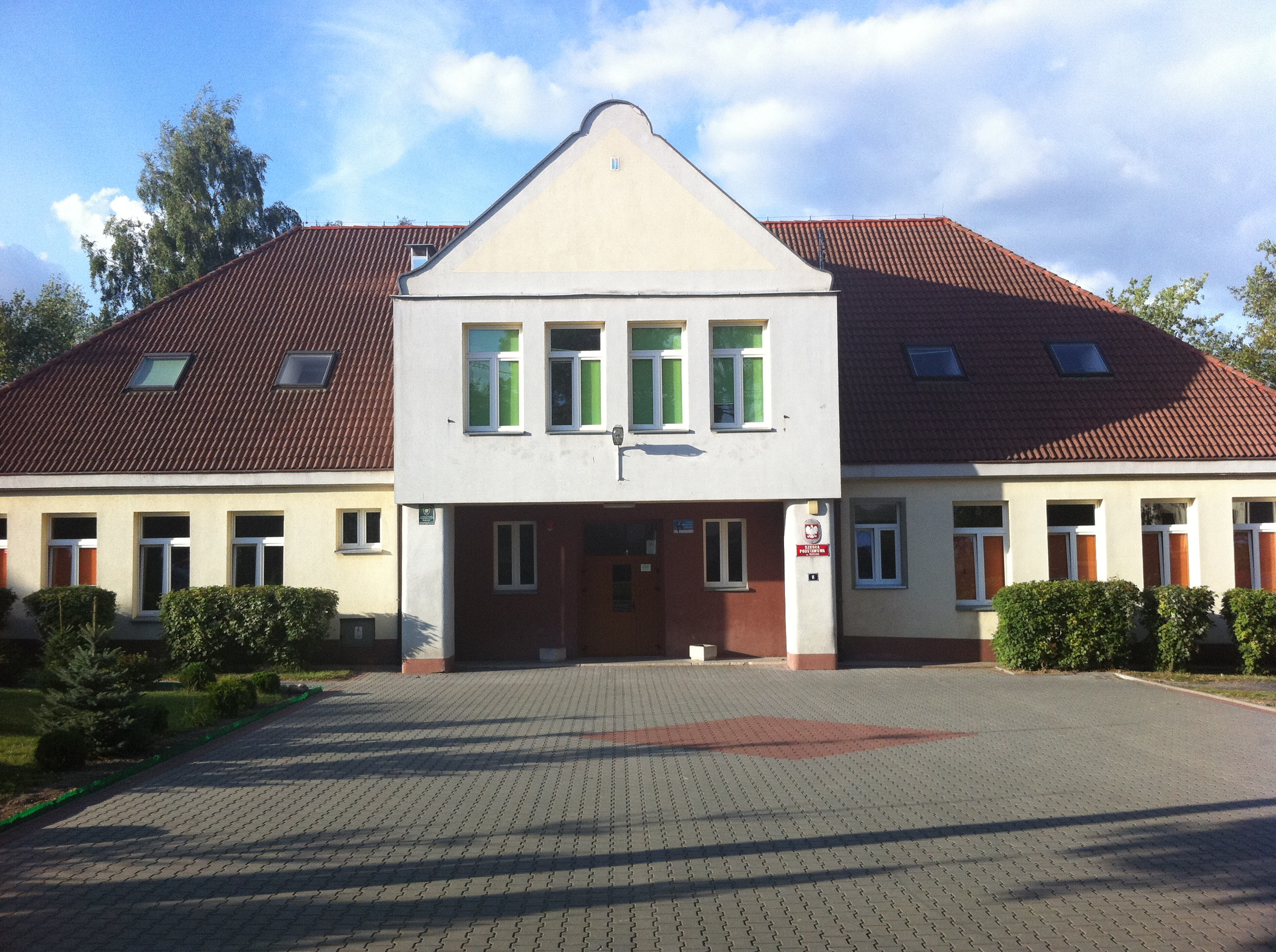 School, Wiry, Poland